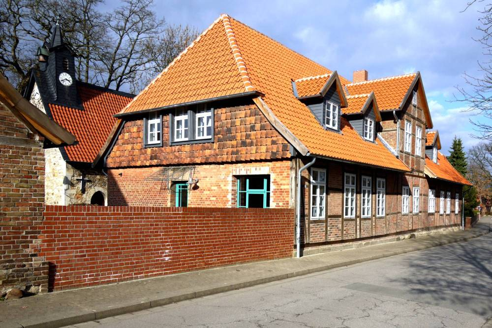 Die renovierte Alte Schule in Wasbüttel